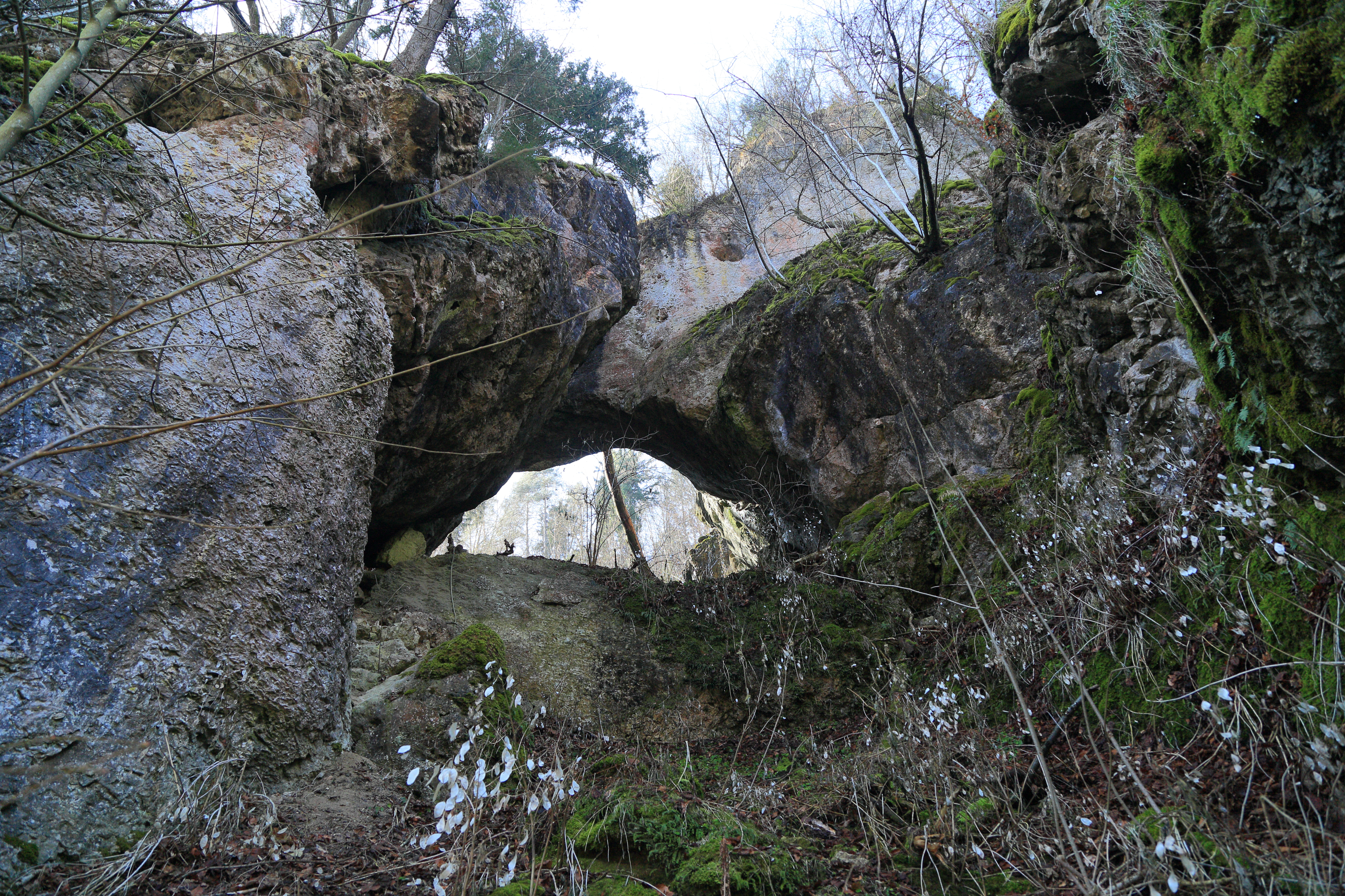 Felstor NW von Burggaillenreuth Geotop-Nummer: 474R057 6233GT000025 Ebermannstadt Forchheim 6233 Ebermannstadt R: 4448193 H: 5516622 450 m ü.NN L: 200 m, B: 30 m, H: 10 m, F: 600 qm Nördliche Frankenalb